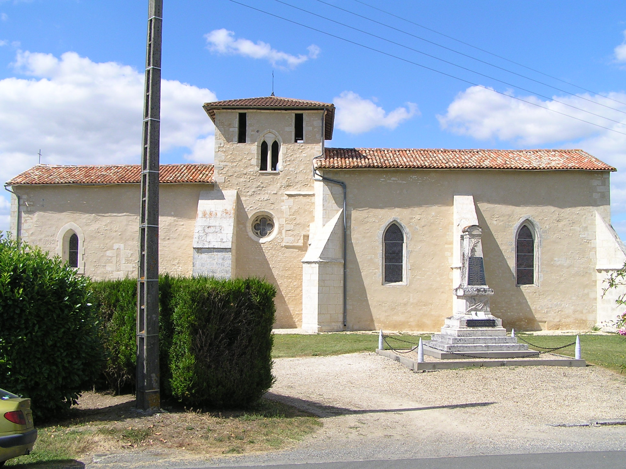 église de Lamérac, Charente, France